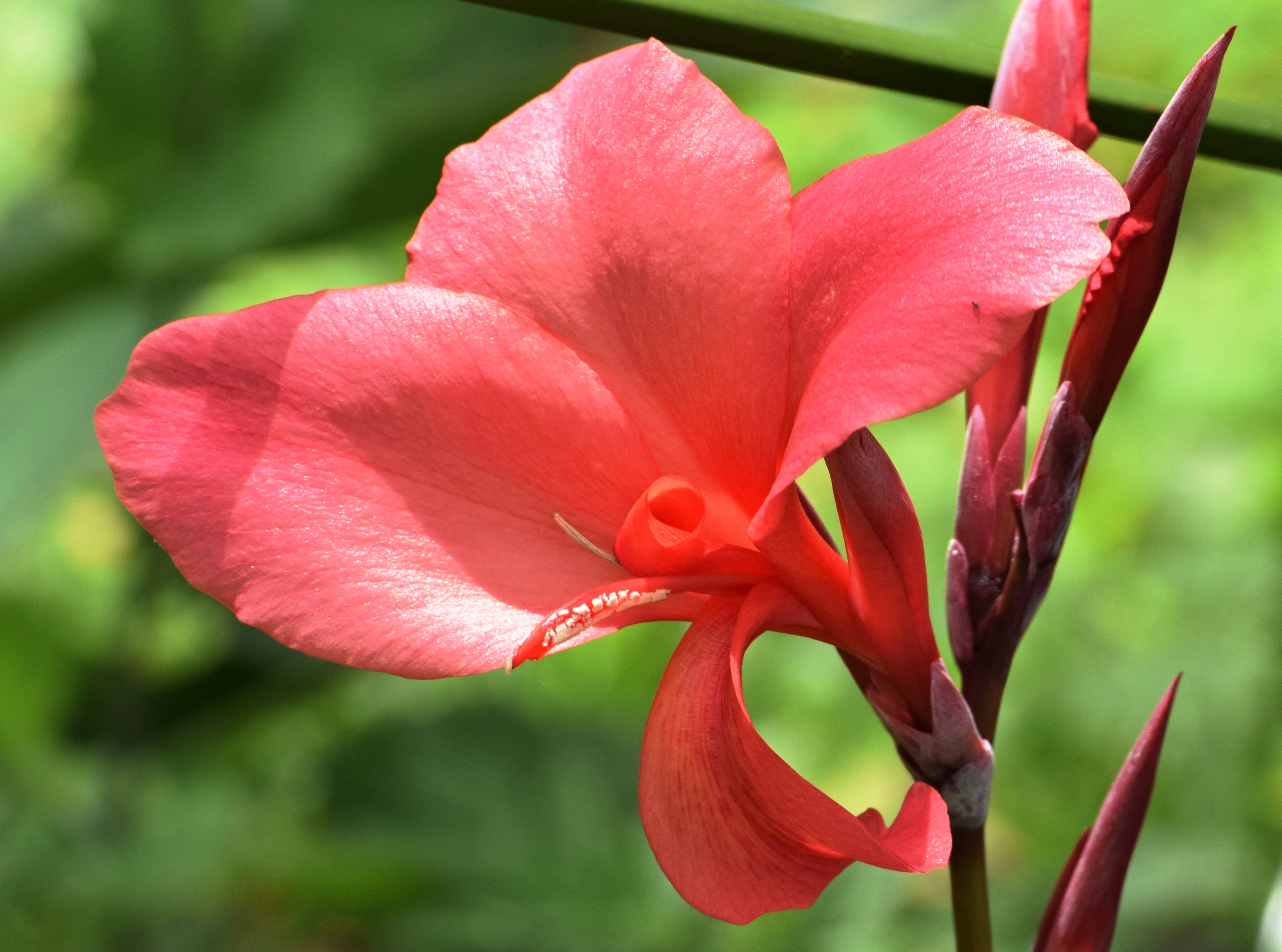 Achira (Canna indica)